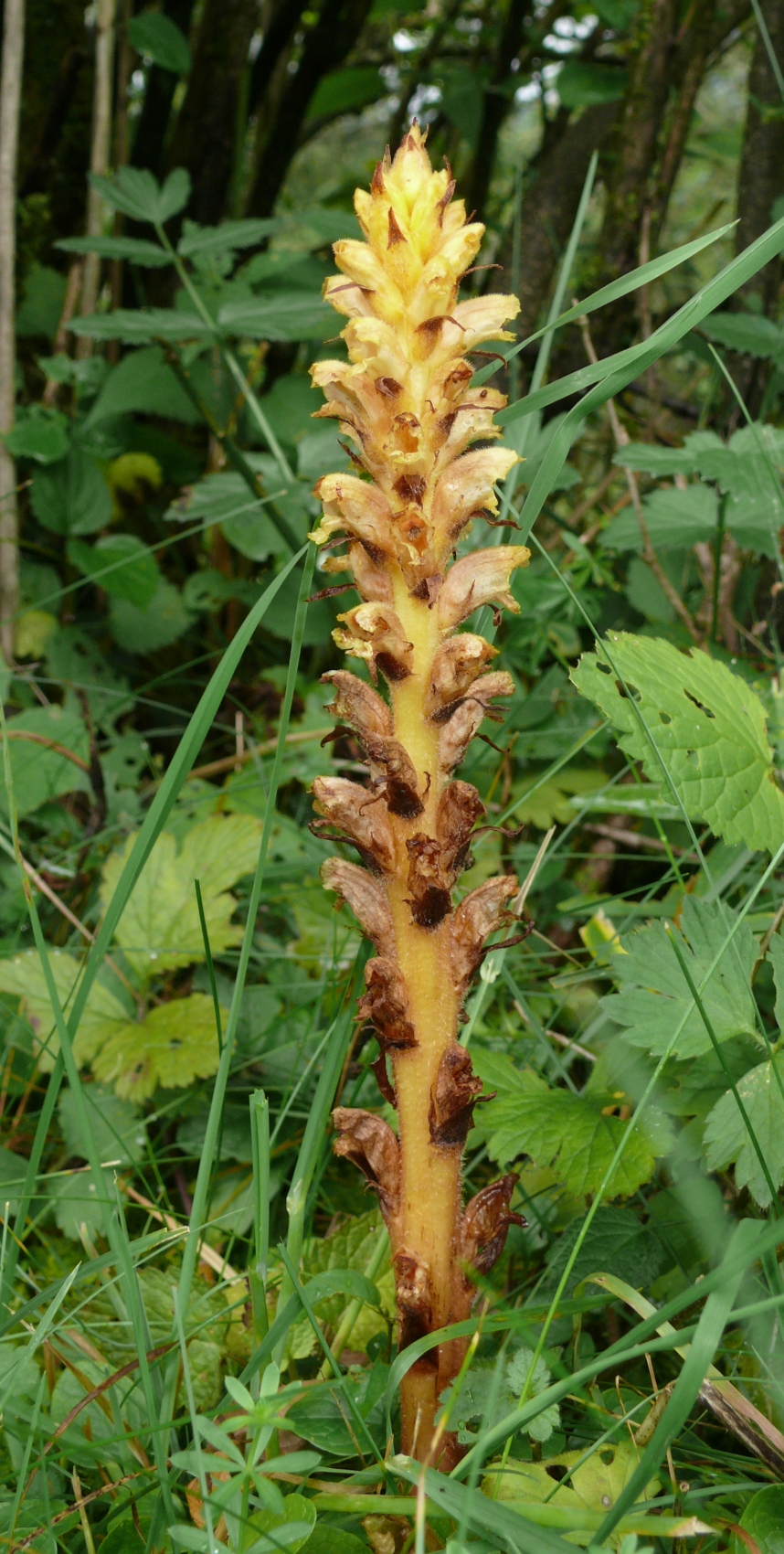 Orobanche lucorum, Allgäuer Alpen, Germany